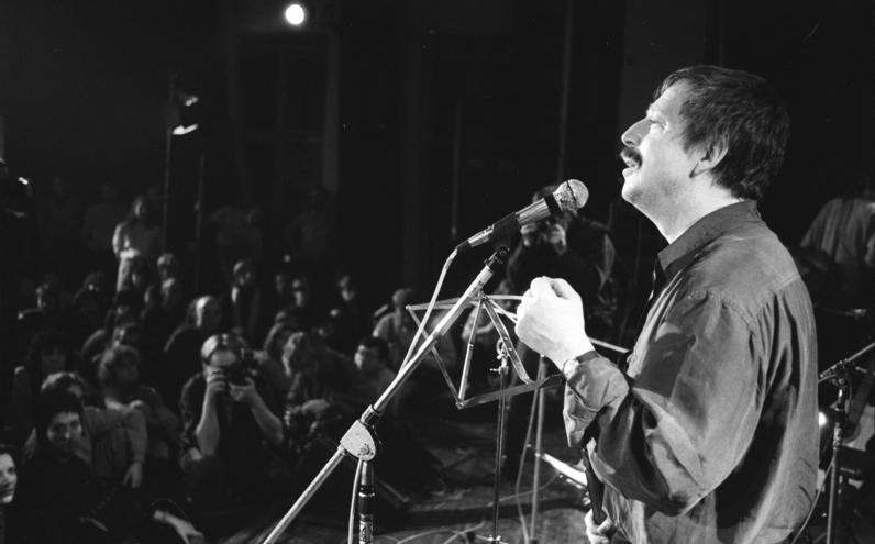 ADN-ZB/Senft/ 3.12.89/ Berlin: Wolf Biermann trat am zweiten Tag seines DDR-Aufenthalts im Berliner Haus der Jungen Talente in einem Konzert unter dem Motto "Verlorene Lieder - verlorene Zeiten" auf. 500 Gäste waren an dem Abend anwesend, der am 2.12.89 für Rundfunk und Fernsehen veranstaltet wurde. Außer Biermann sangen andere aus der DDR ausgewiesene Künstler und DDR-Liedermacher.